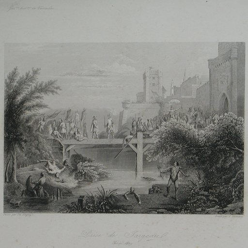 Reproduction de l'huile sur toile de Théodore Aligny intitulée "Prise de Jargeau, 15 juin 1429", œuvre commandée par Louis-Philippe pour le musée historique de Versailles en 1838.